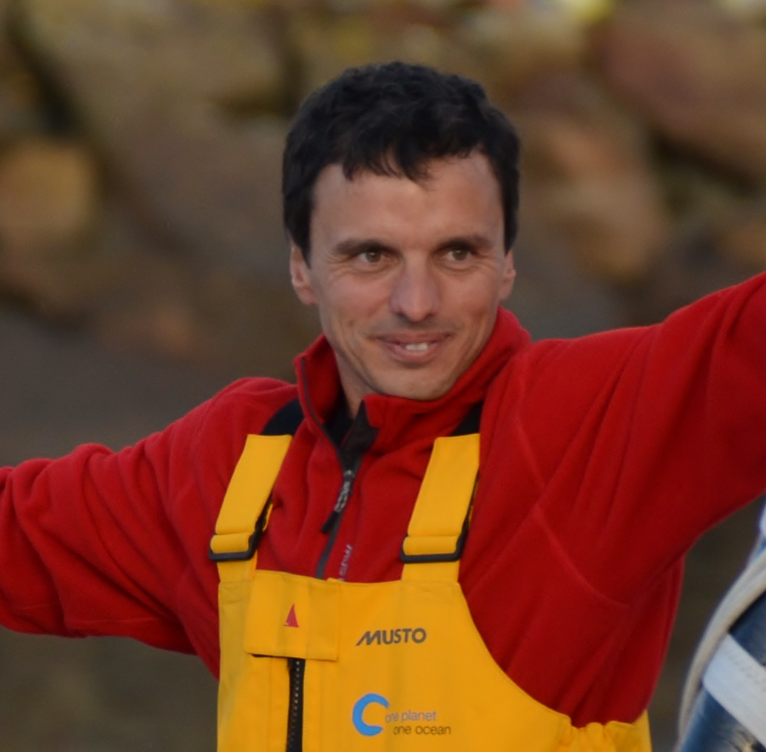 Didac Costa au départ du Vendée Globe 2016-2017